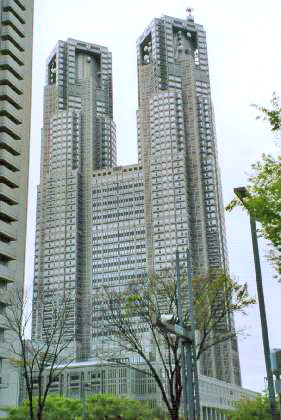 Photo personelle; mairie de Tokyo par Kenzo Tange Licence : GDFL